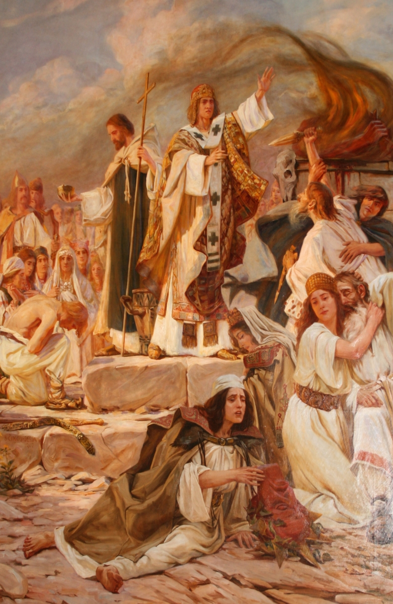 Pokrštenje Hrvata, rad Bele Čikoša Sesije u Hrvatskom institutu za povijest u Zagrebu